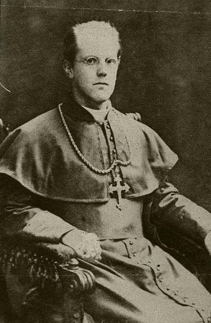 Mgr. Th.A.L.M. van Roosmalen (1875-1957)